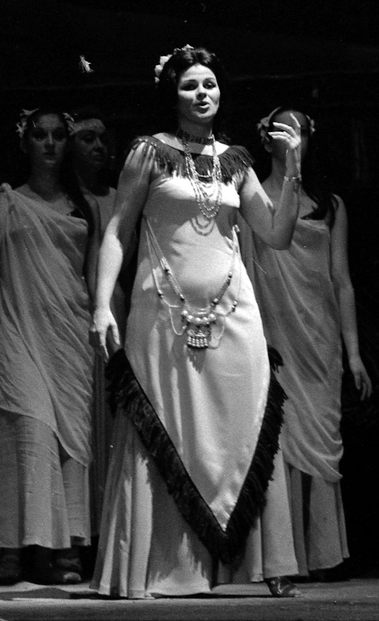 Théâtre du Capitole. Le 14 Octobre 1971. Vue de la représentation de Samson et Dalila au théâtre du Capitole.